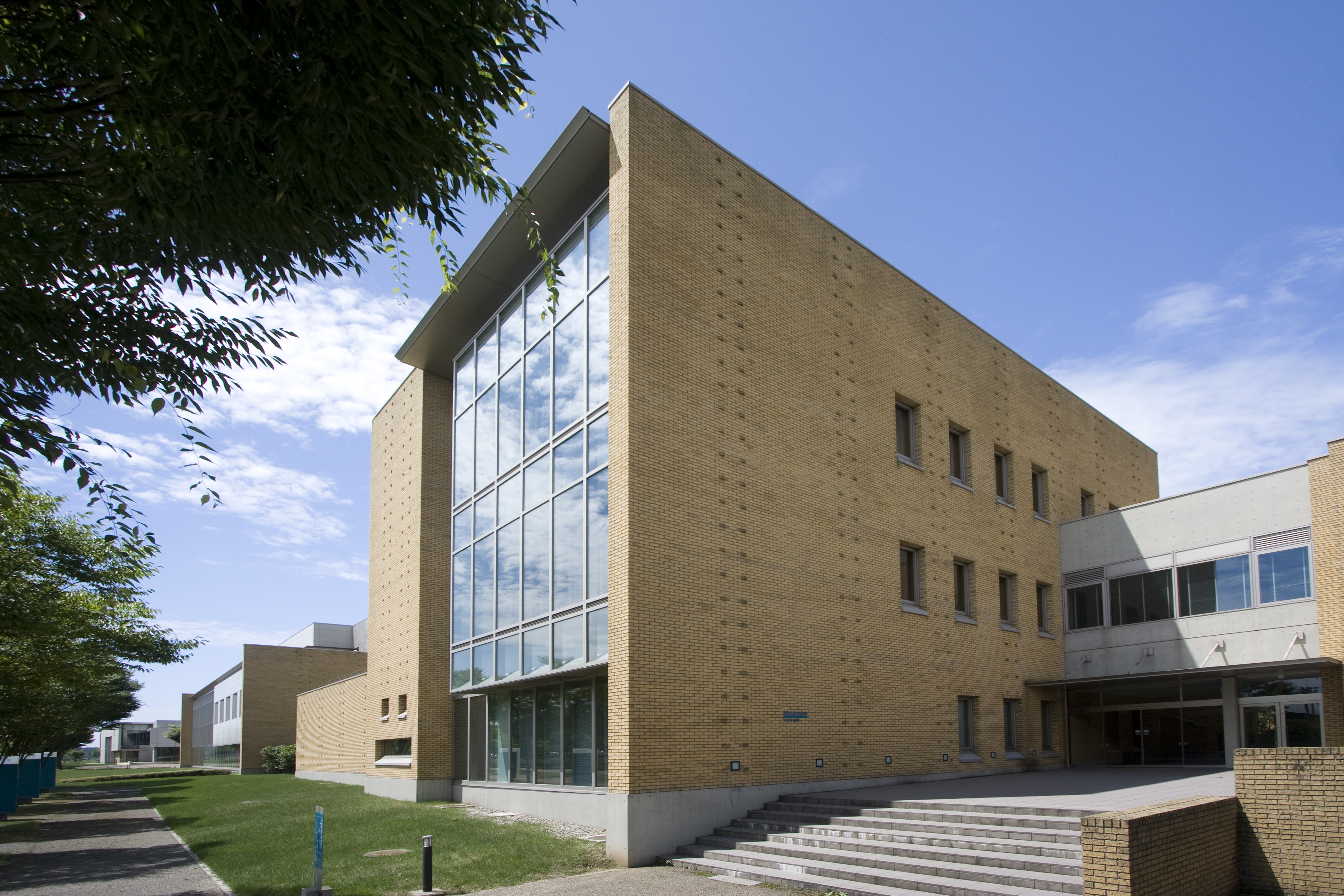 東北公益文科大学